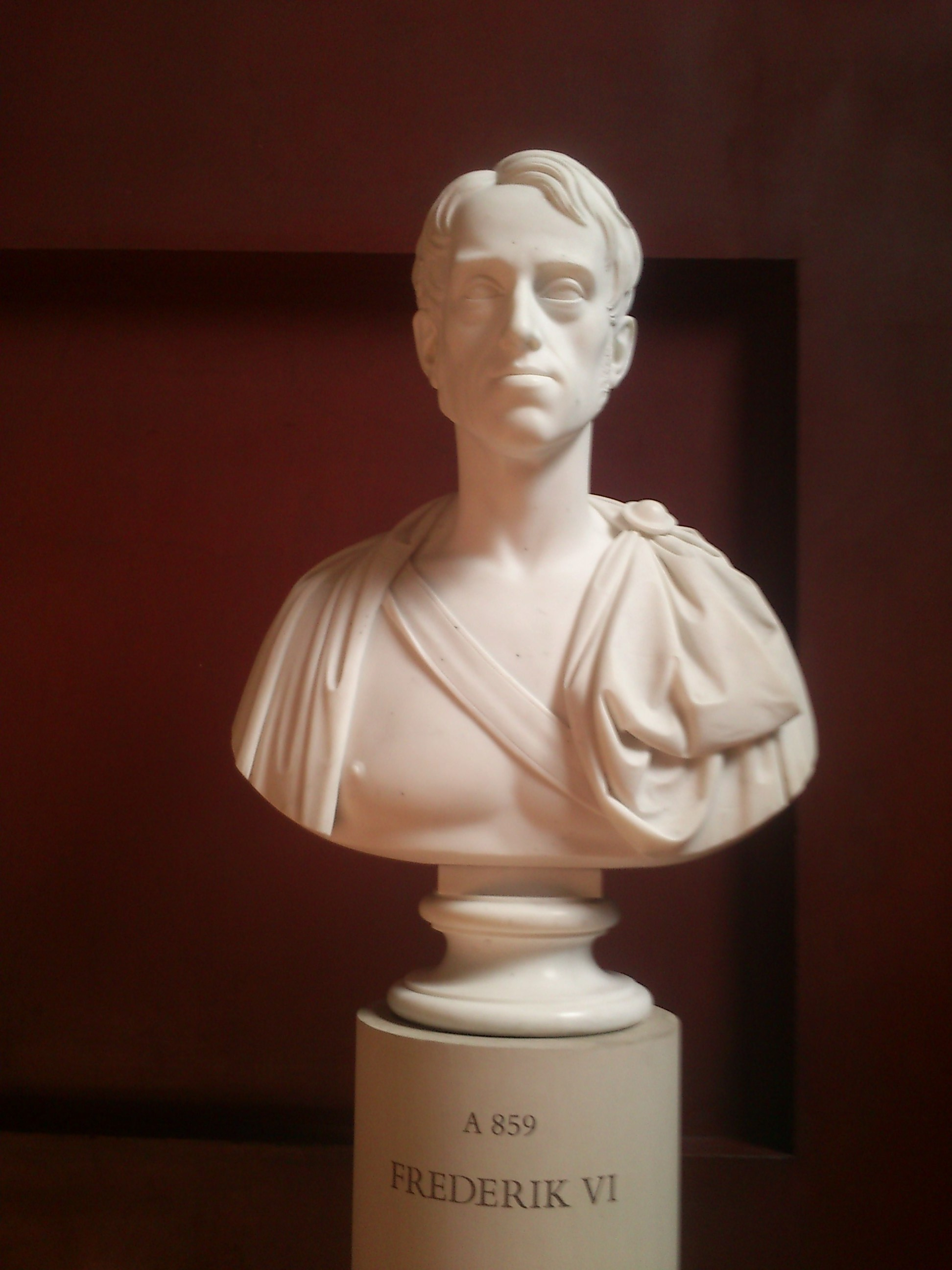 En byste lavet af Bertel Thorvaldsen